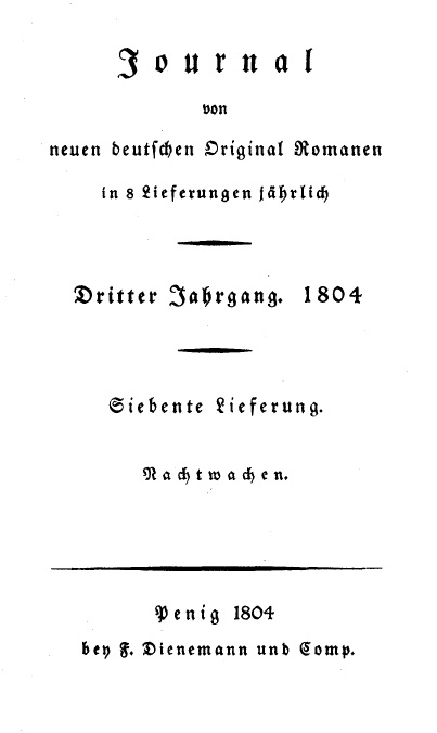 Titelblatt des 1804 erschienenen Romans Nachtwachen von Bonaventura (August Klingemann).